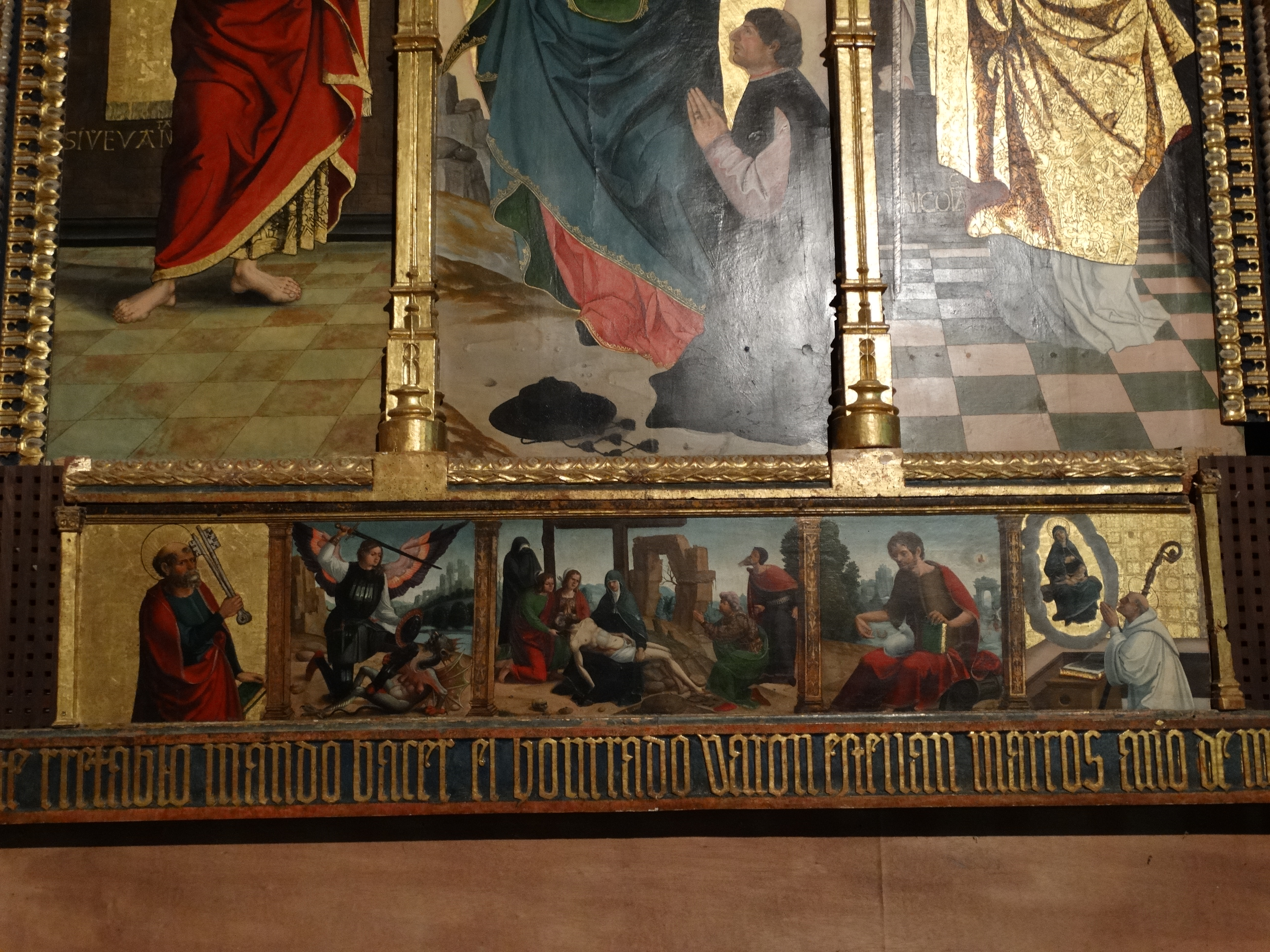 Torremormojón, provincia de Palencia, España. Iglesia de Santa María del Castillo. Retablo del maestro Calzada. Predela.